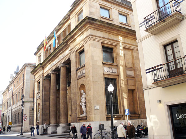 Fachada principal de la Biblioteca en la calle Jovellanos, Gijón